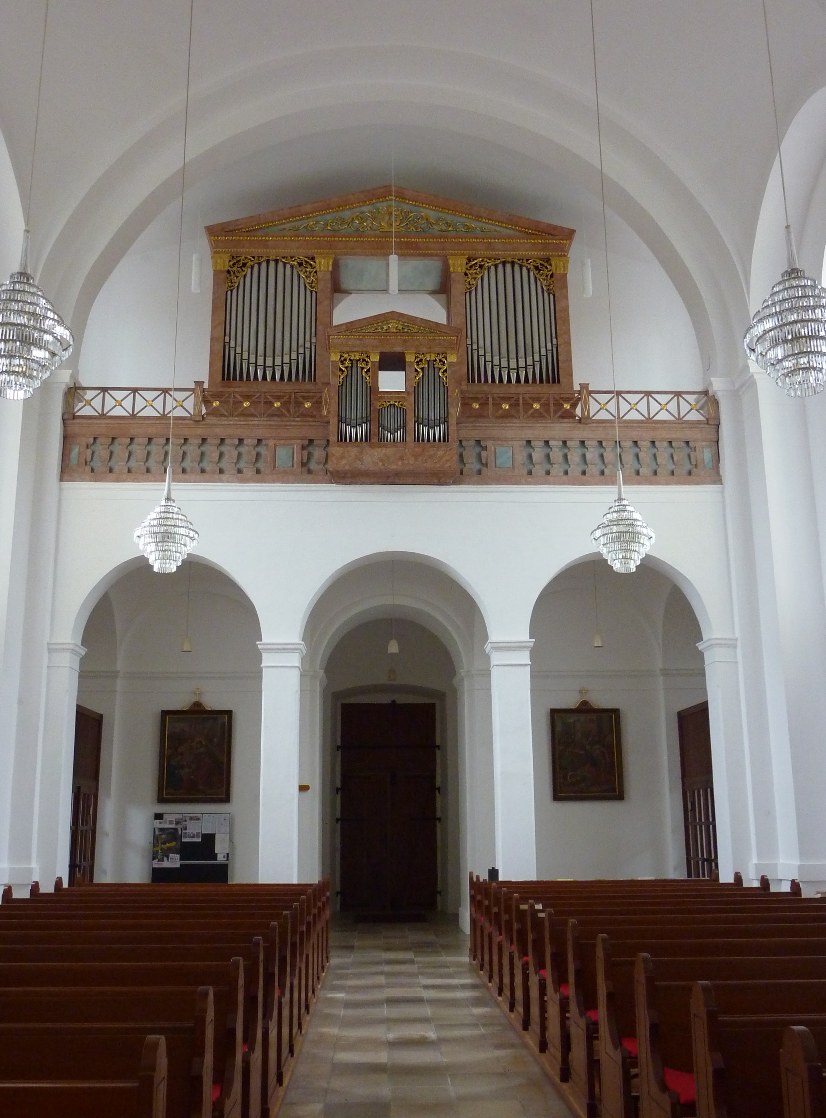 Orgel (Josef Loyp, 1854), Pfarrkirche Kammersdorf, Nappersdorf-Kammersdorf, Niederösterreich